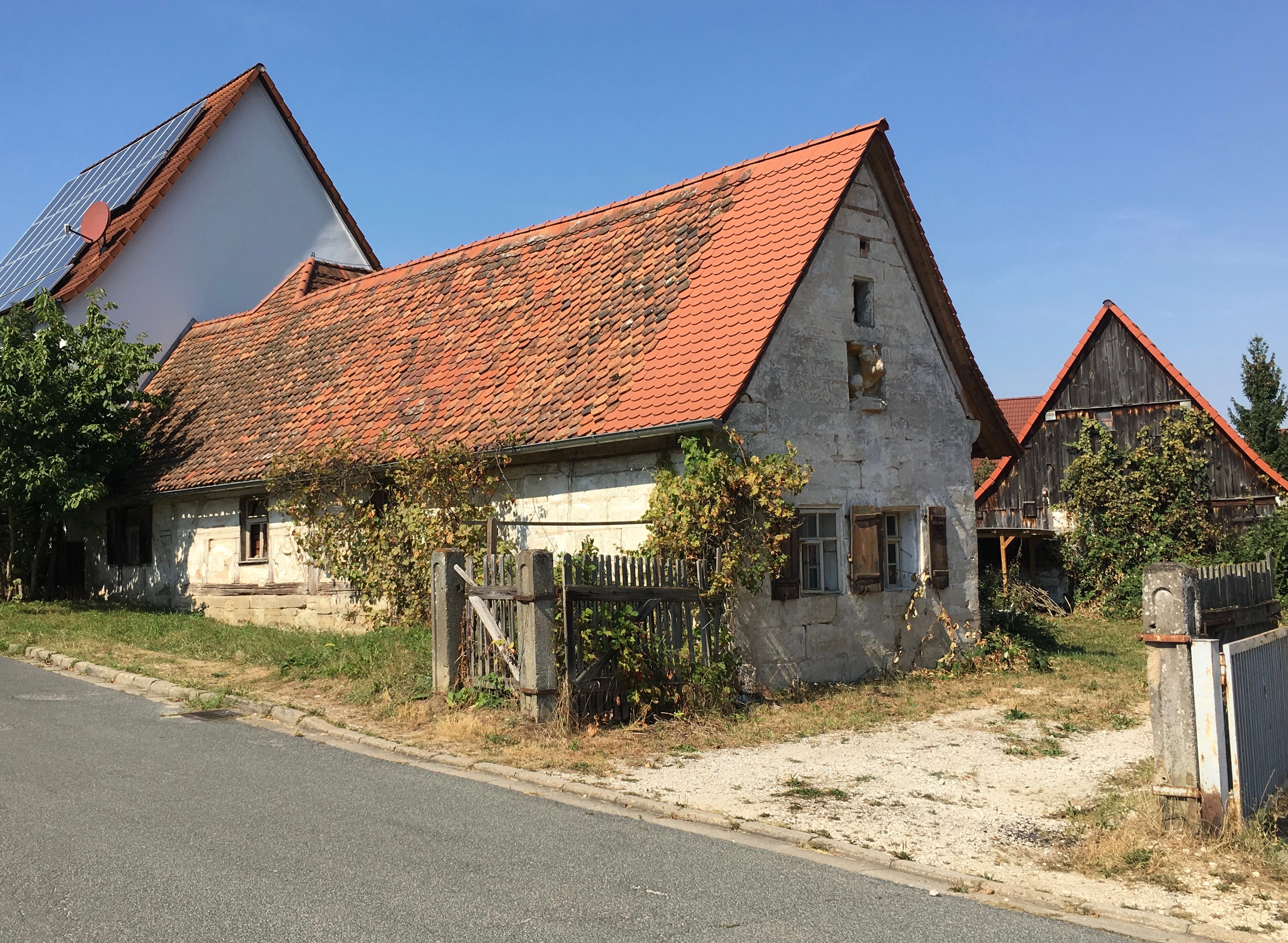 Oberschöllenbach Rheinstraße 2